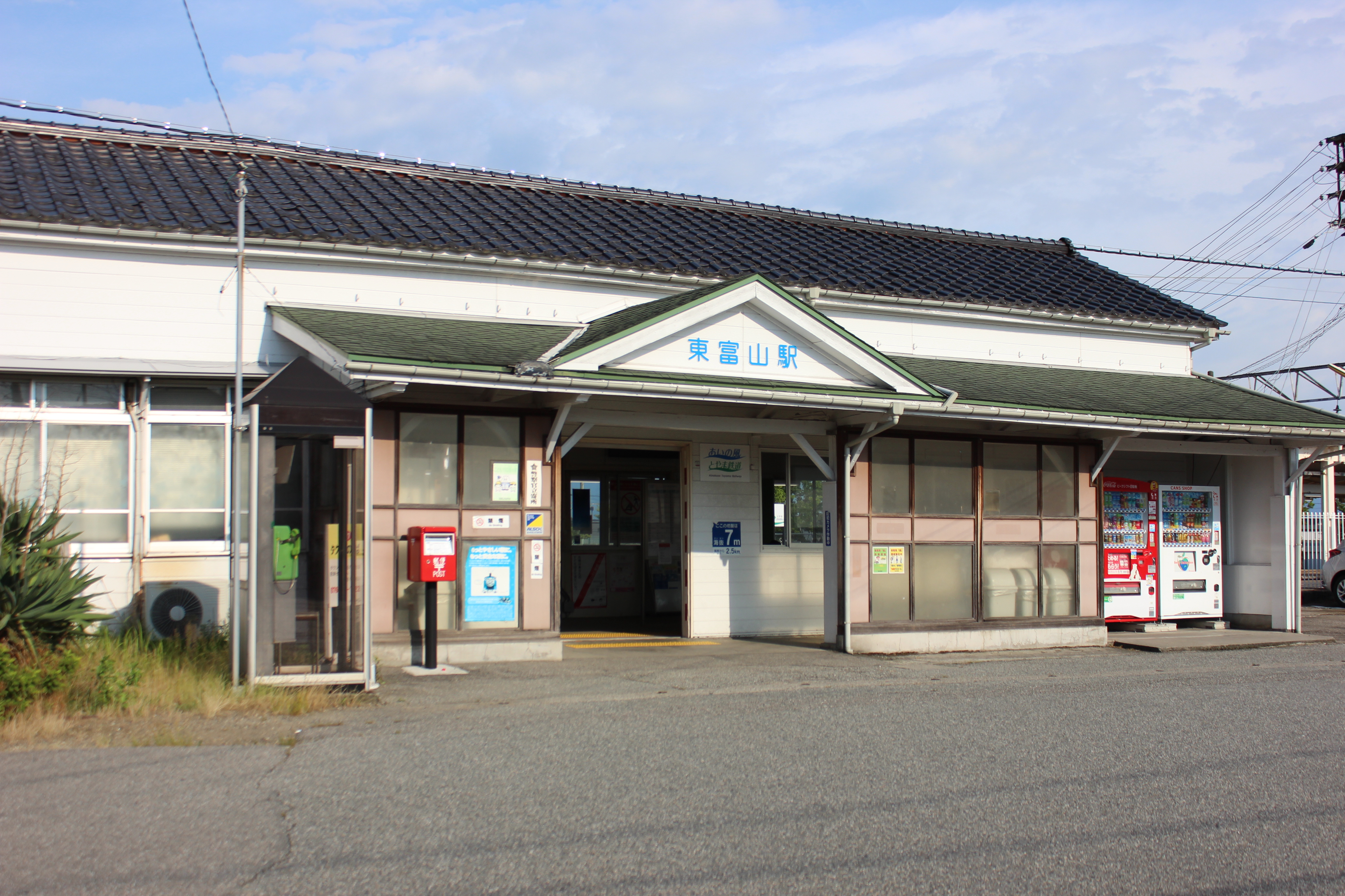 あいの風とやま鉄道東富山駅（富山県富山市） Canon EOS Kiss X5